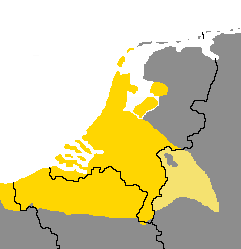 Gebied Nederfrankisch inkl. Limburgs; aangepast van Bild:Niederfränkisches Mundartgebiet.PNG, oorspronkelijk getekend door Postmann Michael